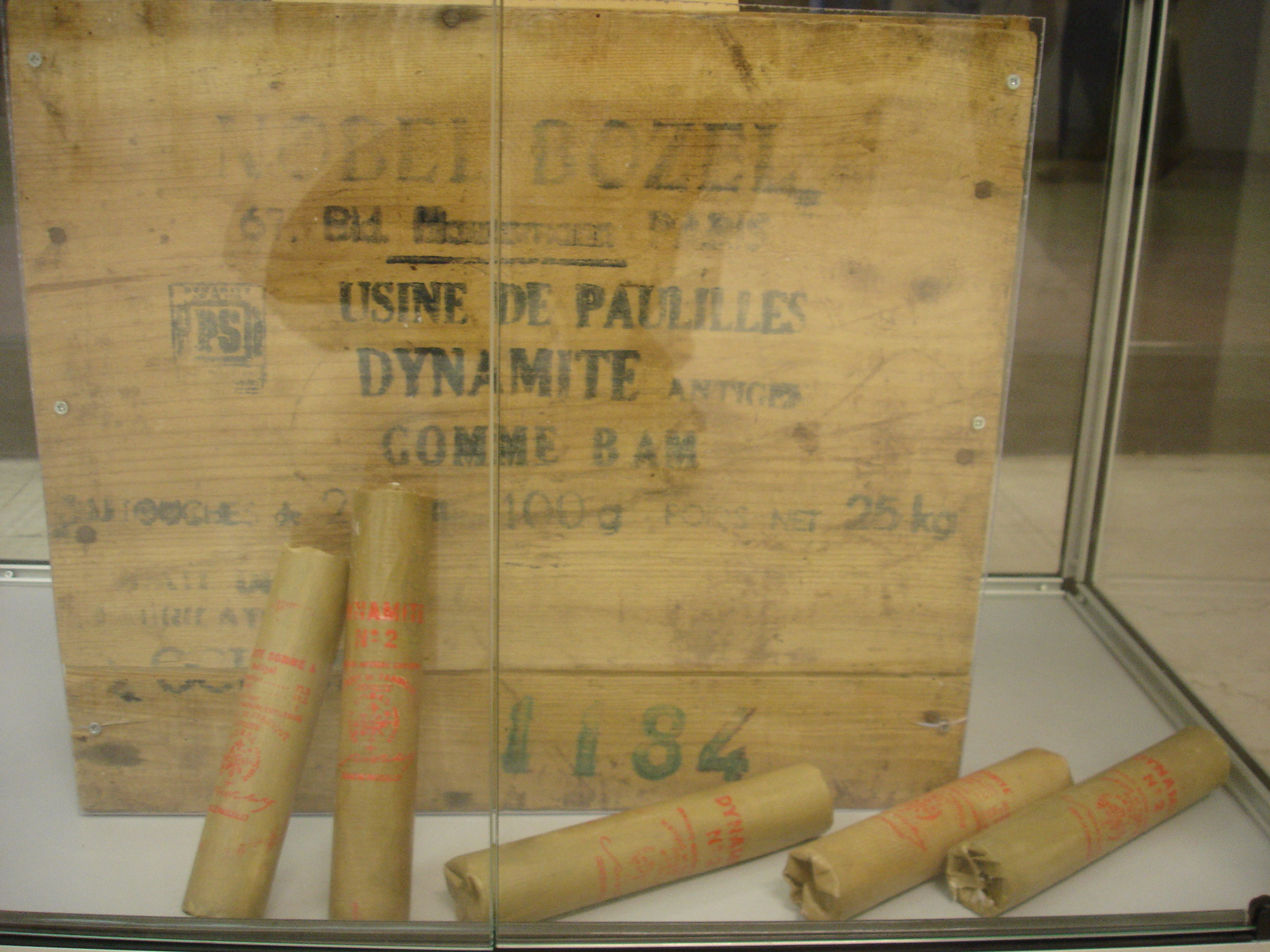 Photographie d'une caisse de cartouches de dynamite-gomme BAM Nobel-Bozel (1957-1984) exposée dans le musée de l'ancienne Dynamiterie de Paulilles, France. Cartouches de 100g, caisse de 25kg.